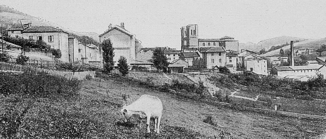 Dictionnaire illustré des communes du département du Rhône. Tome 1 / par MM. E. de Rolland et D. Clouzet.